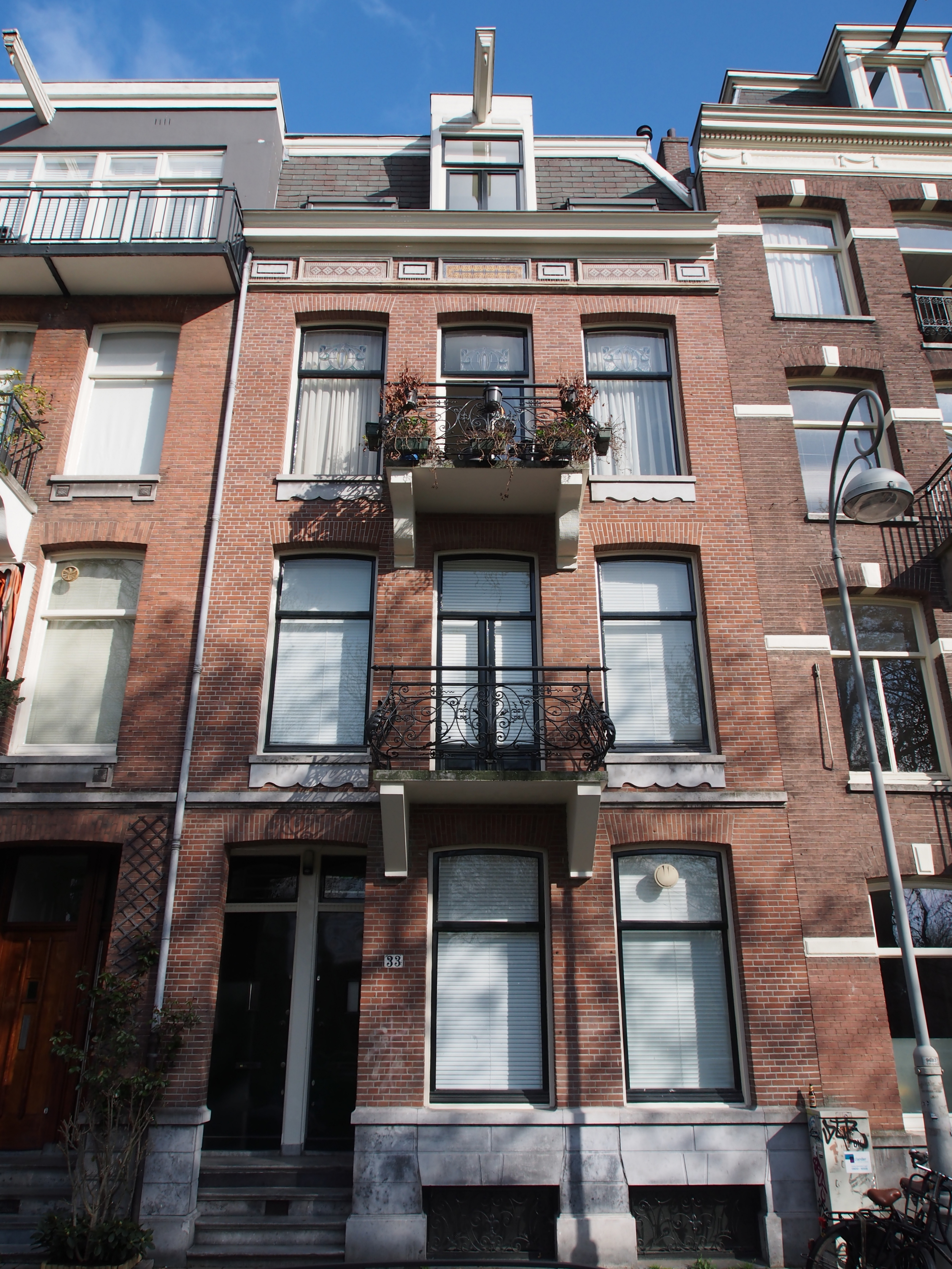 Monument in Amsterdam.